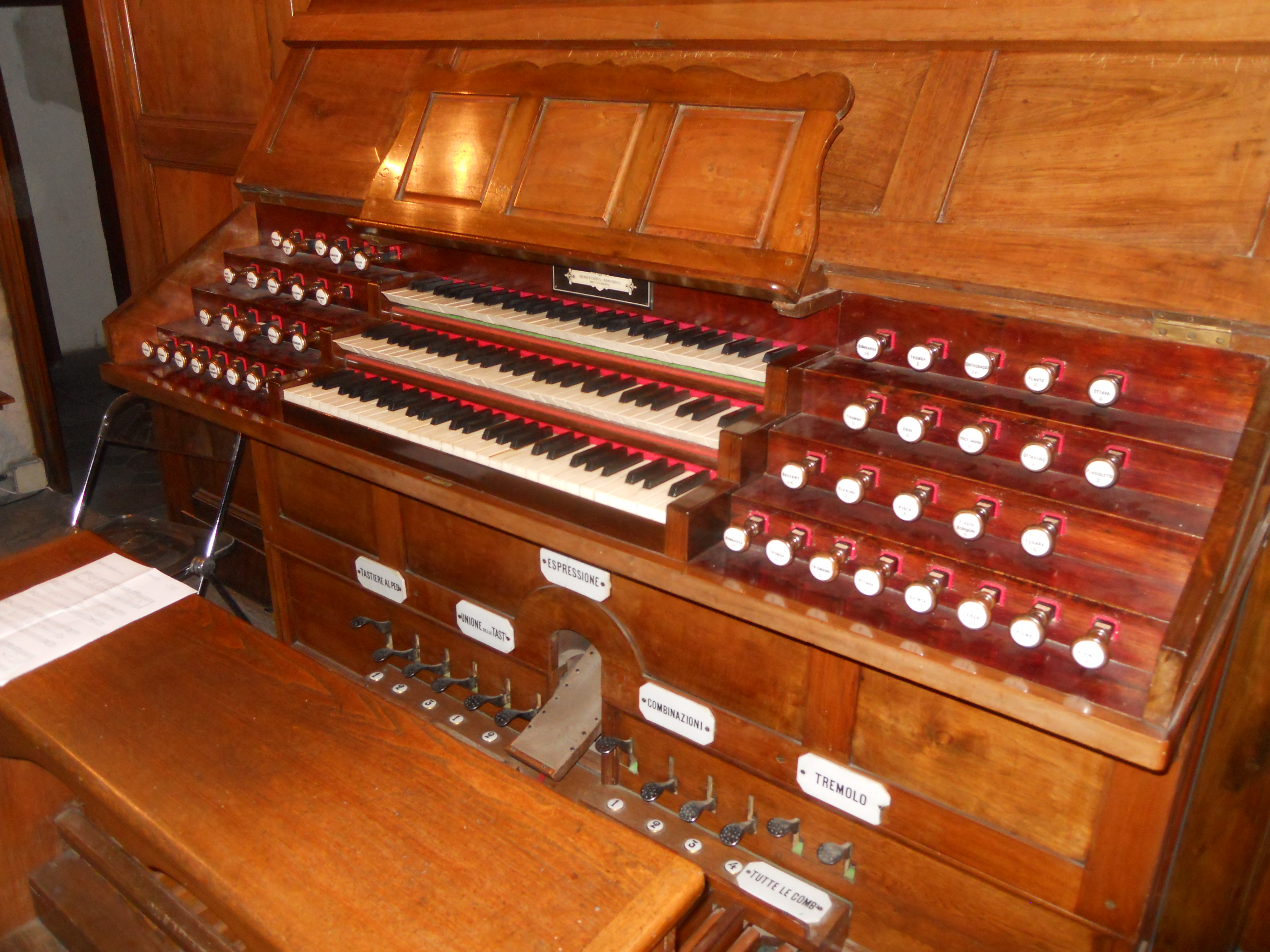 La consolle dell'organo Nicola Morettini (III+P/46) di destra dell'abside della basilica di San Giovanni in Laterano in Roma